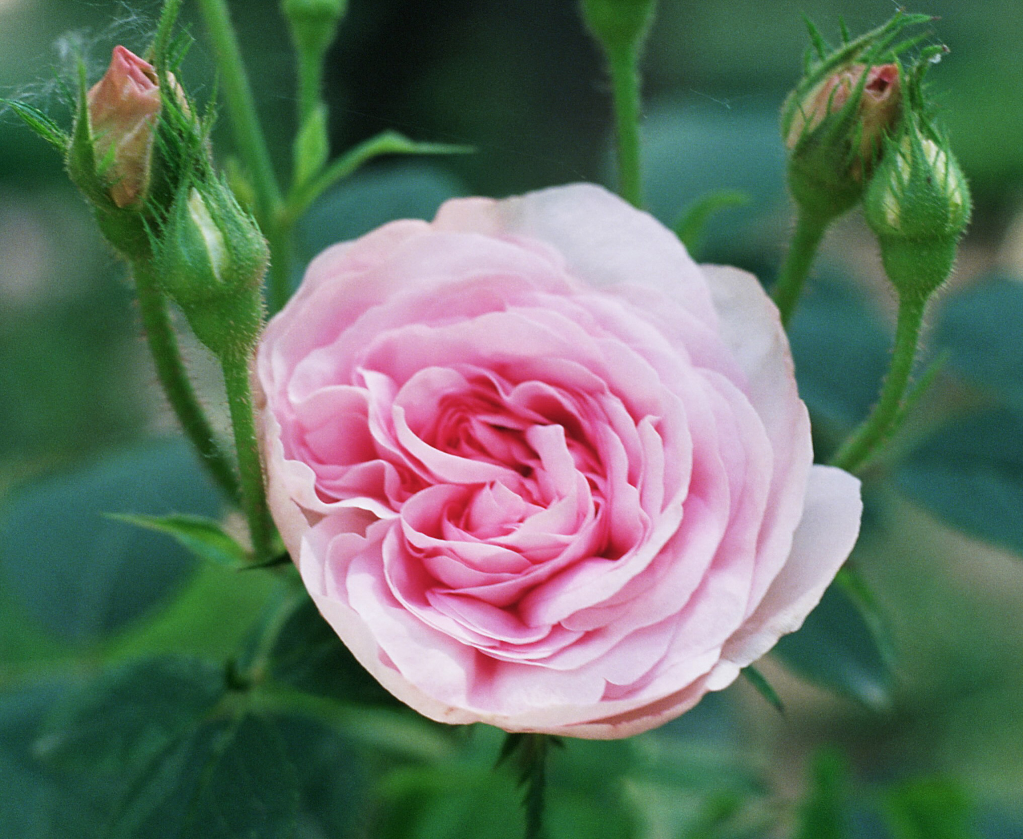 Rosa 'Königin von Dänemark', gr. Alba, sect. Rosa. Real Jardín Botánico, Madrid